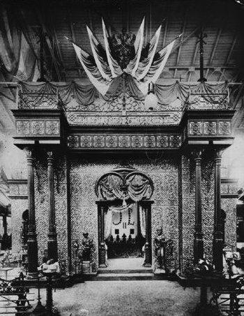 Каслинский чугунный павильон 1896 г.